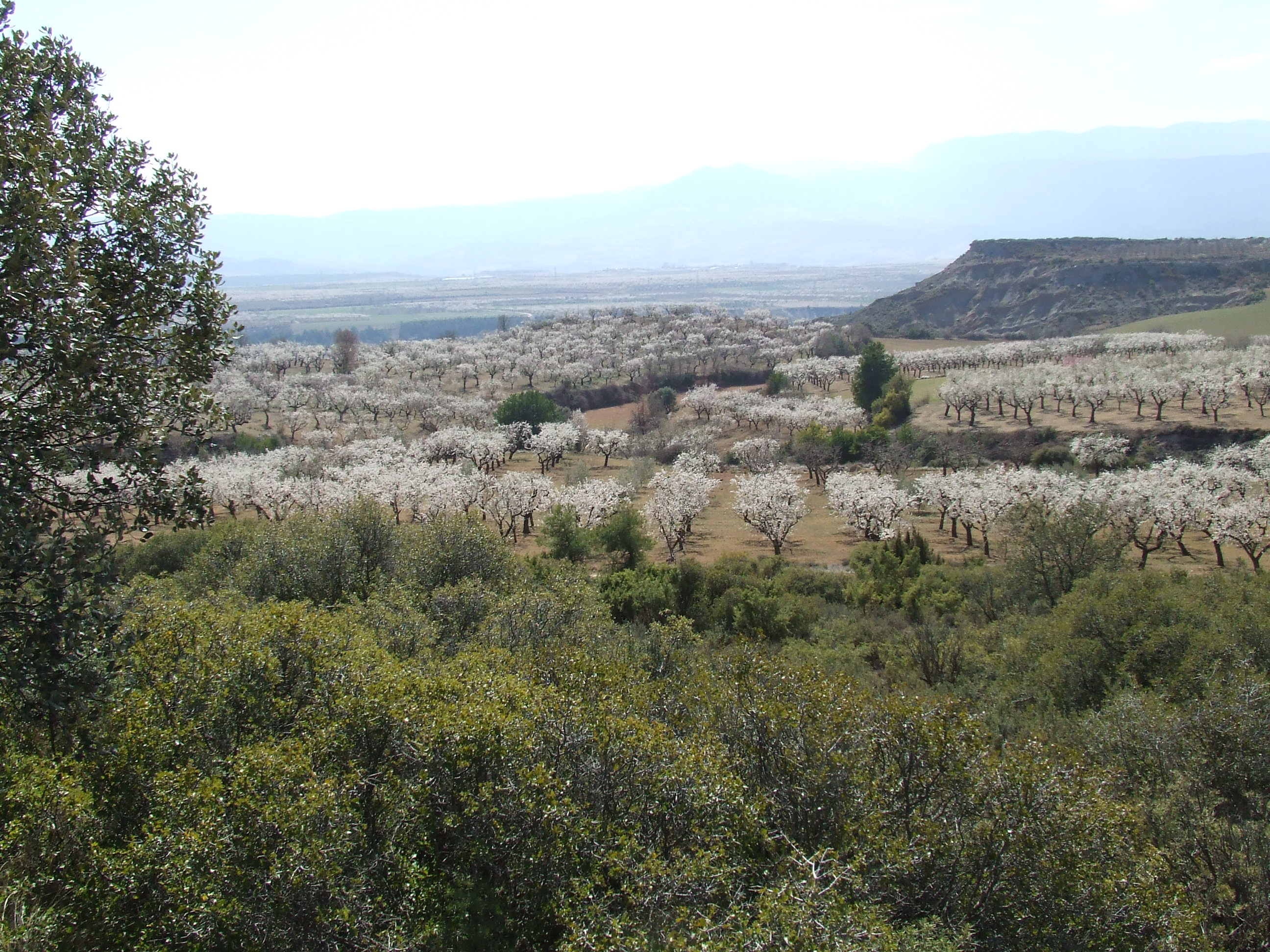 Los Planells amb els ametllers florits (Abella de la Conca, Pallars Jussà)